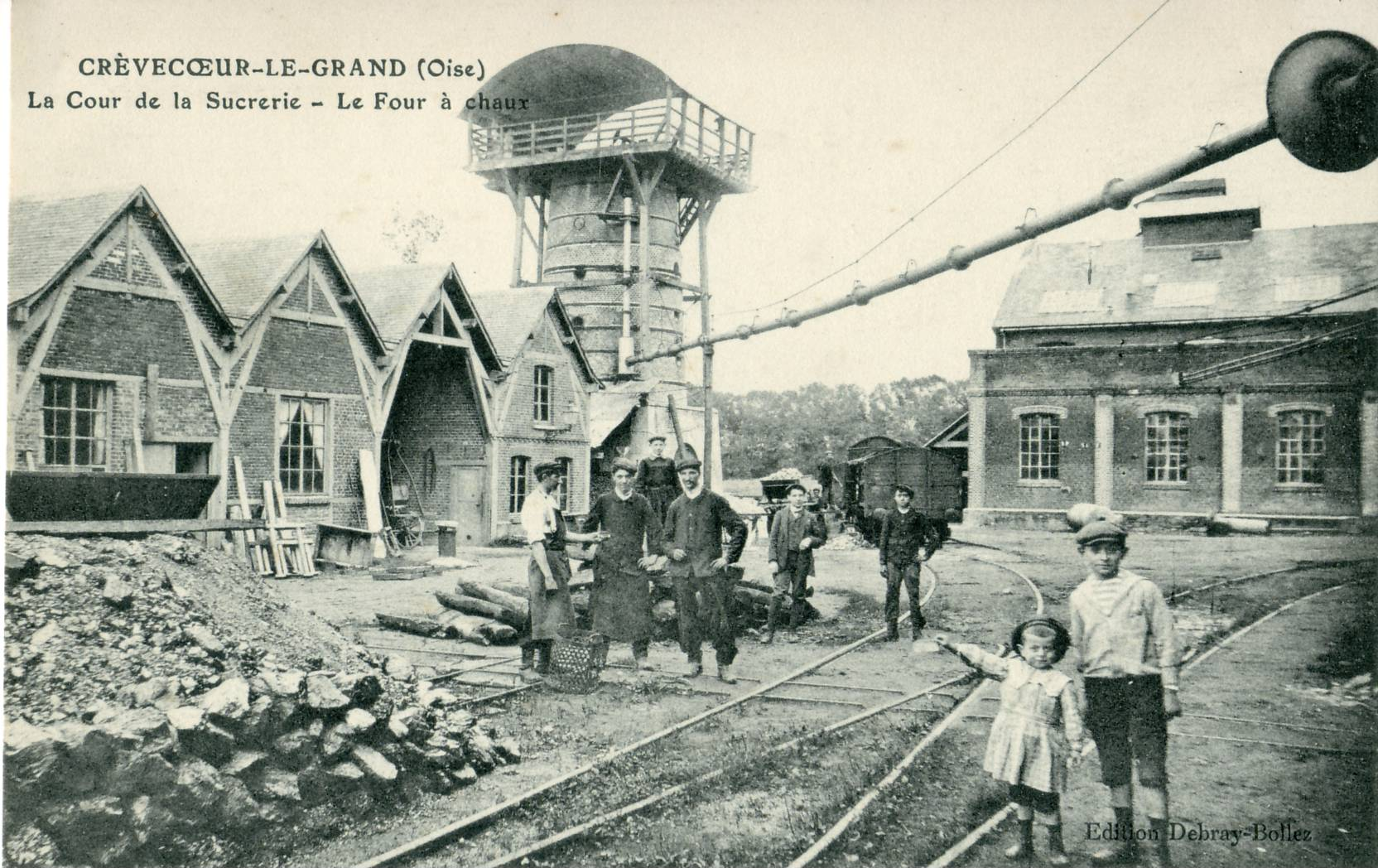 Carte postale ancienne éditée par Debray-Bollez Crèvecœur-le-Grand : La Cour de la sucrerie - Le four à chaux. La sucrerie Dufour avait fait construire un embranchement particulier de 820 m afin de la raccorder à la gare de Crèvecœur-le-Grand.